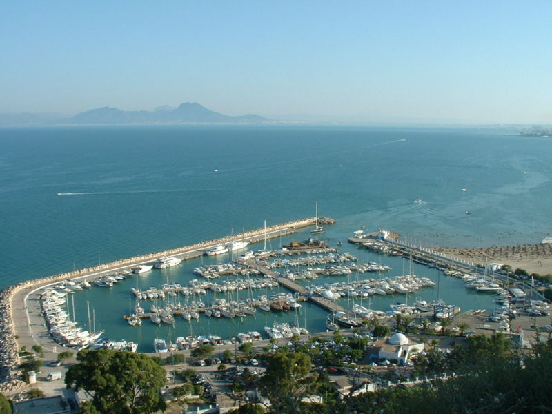 Photographie personnelle du port de Sidi Bou Saïd, sur la baie de Tunis